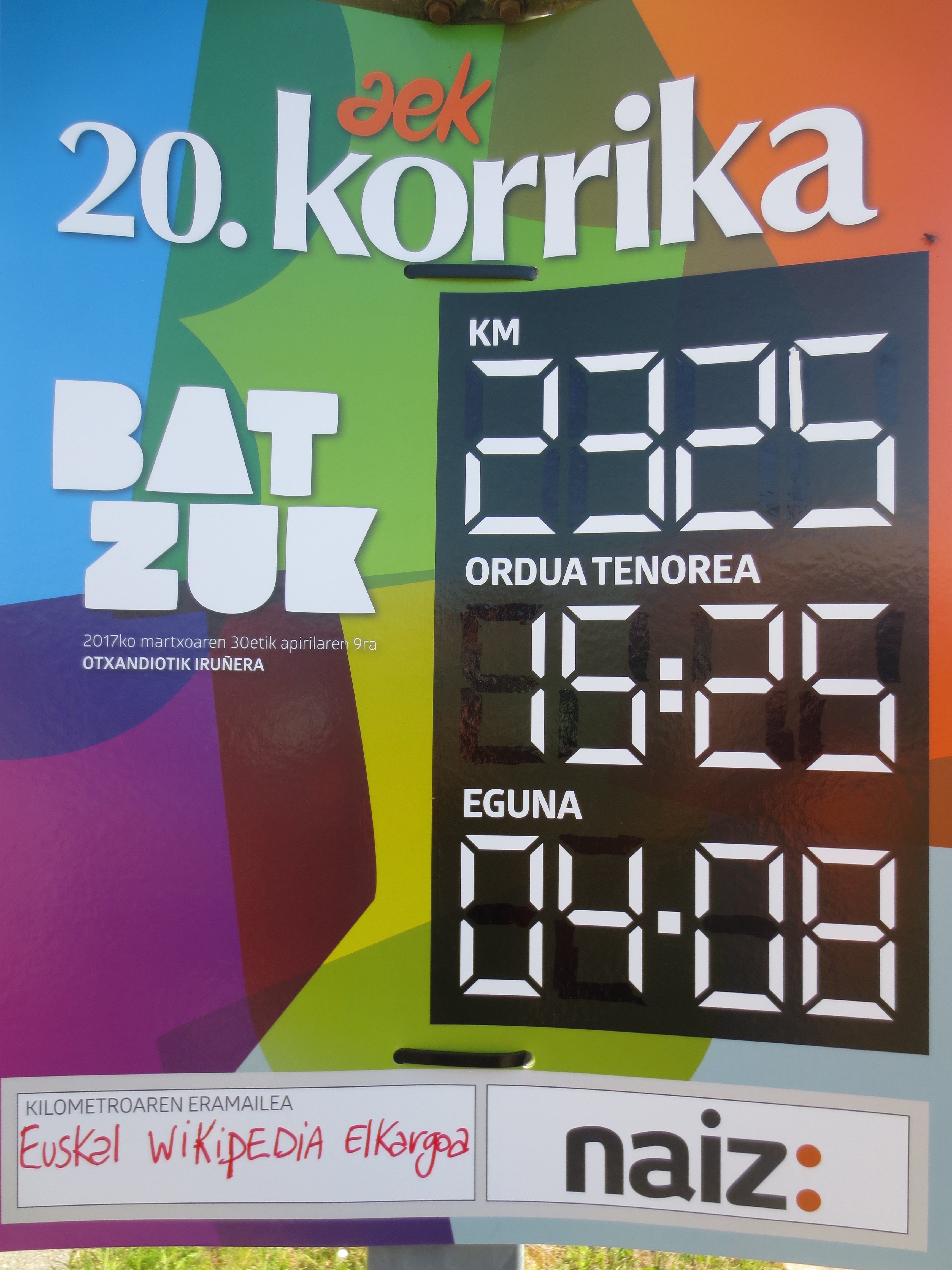 2017. urtean, 20. Korrika. Euskal Wikilarien Elkarteak erosi zuen kilometroaren kartela.